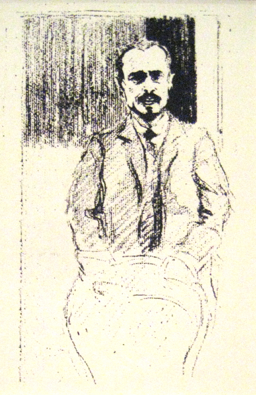 Ю.К. Арцыбушев. Портреты политических деятелей. Москва, 14 августа 1917. ГИМ. Зарисовки с натуры, выполненные во время Государственного совещания в Москве, были опубликованы в издательстве Д.Я. Маковского.